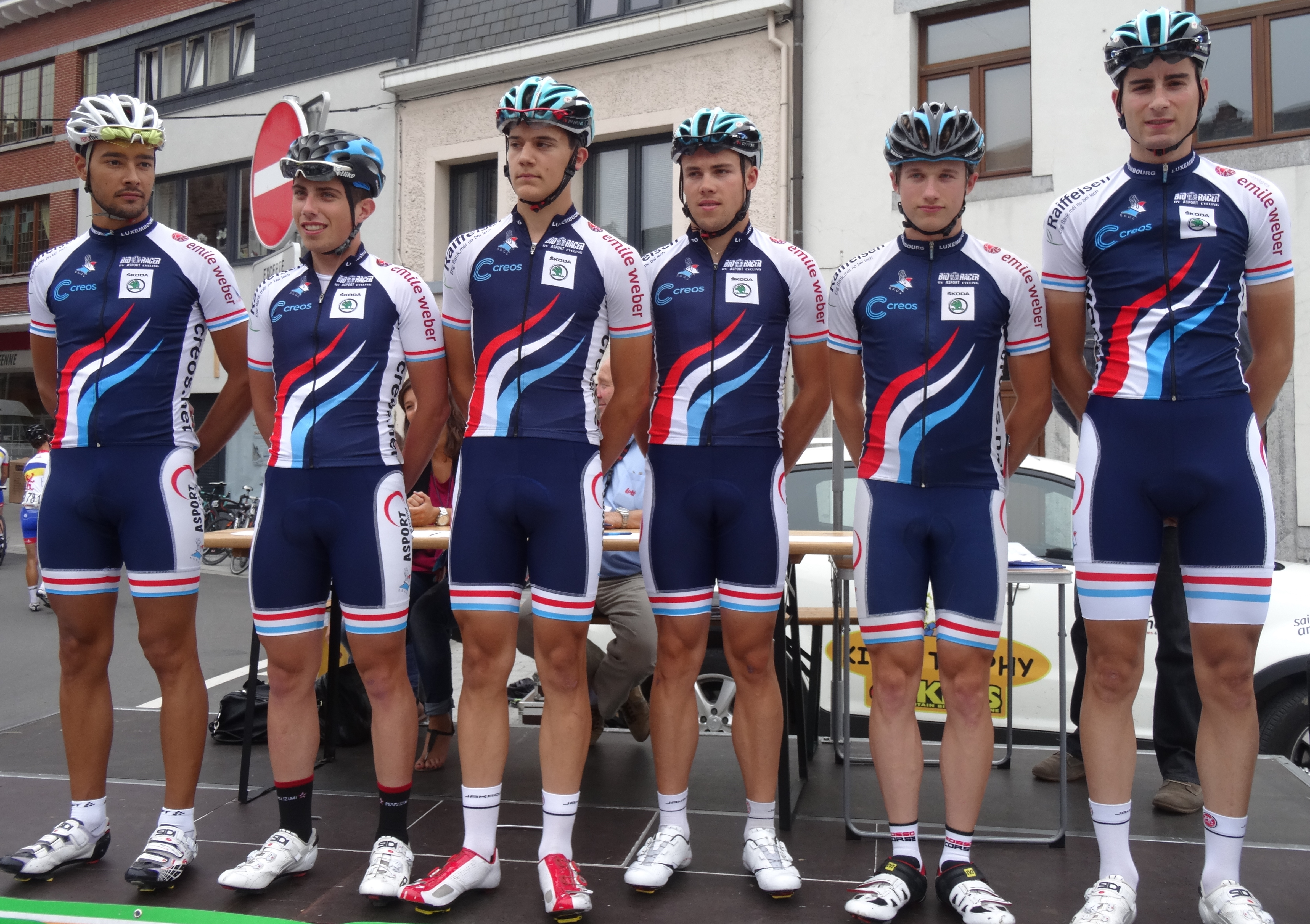 Reportage photographique réalisé le mercredi 6 août à l'occasion du départ de la première étape du Tour de la province de Namur 2014 à Jambes (Namur), Belgique.